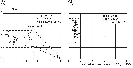 Rendimiento de trigo y la salinidad del suelo antes (A) y despues (B) la instalación de un sistema de drenaje subterráneo en un área piloto en el delta de Nilo, Egipto.